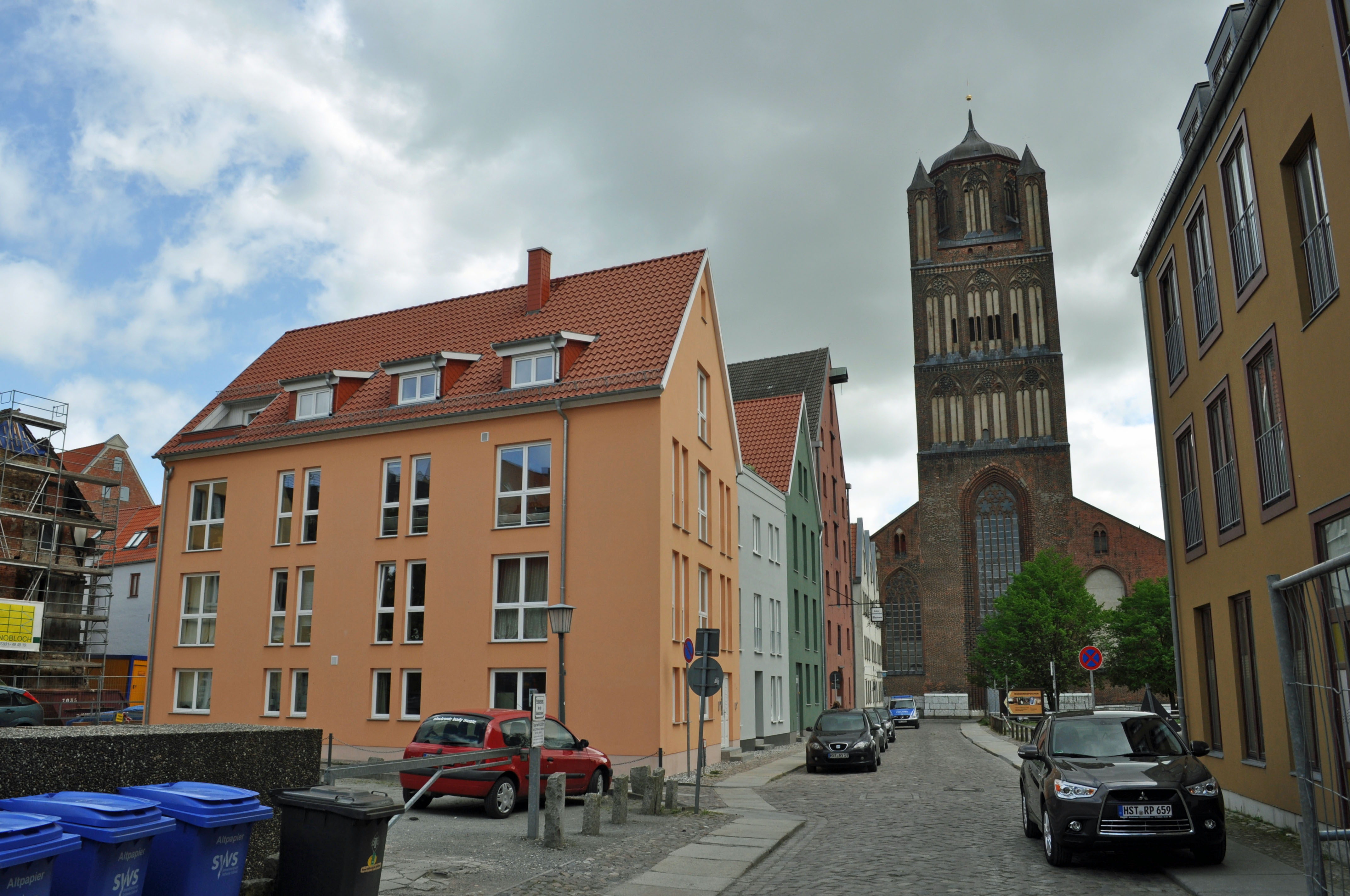 Gebäude in Stralsund, siehe Dateiname